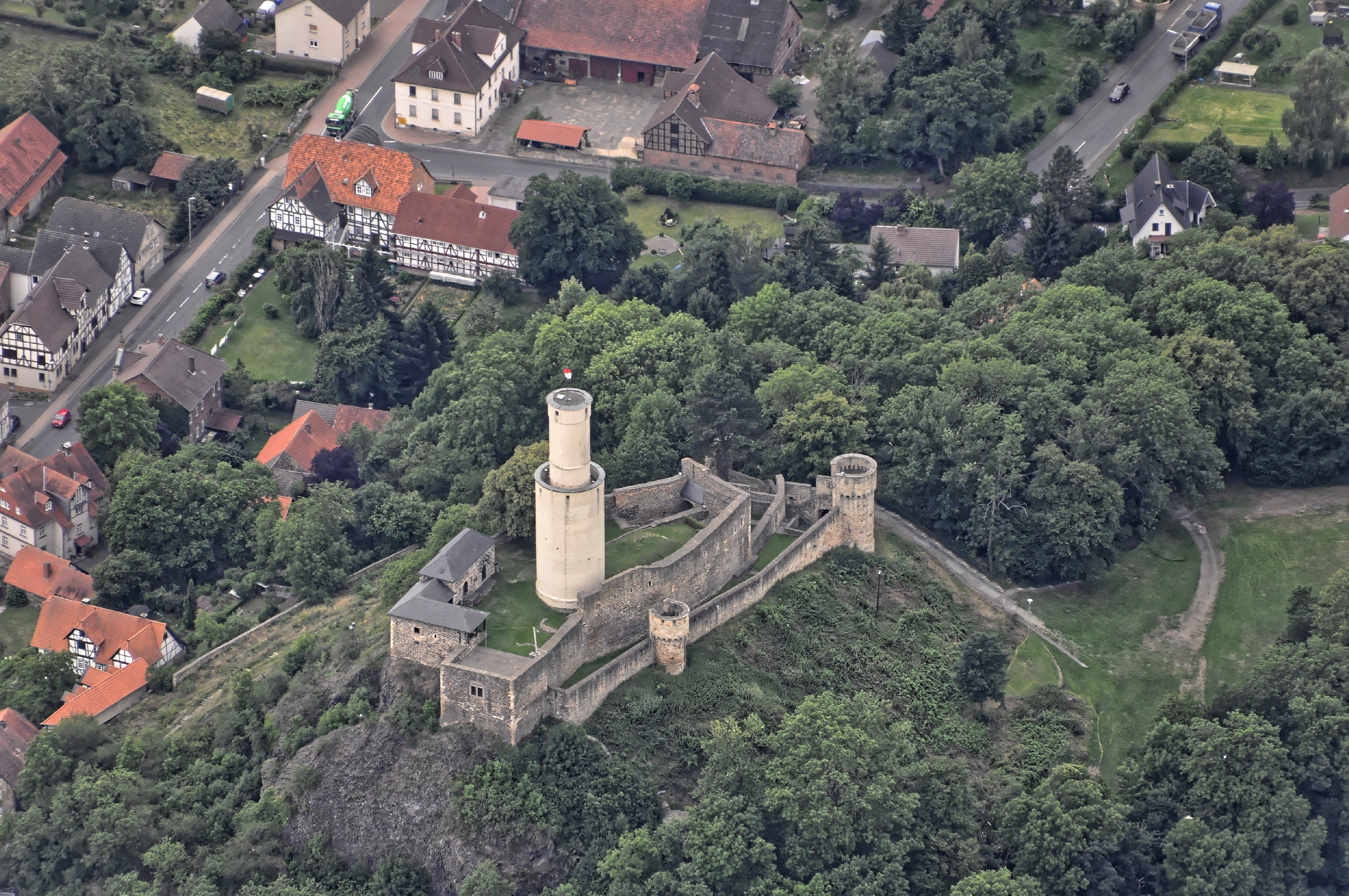 Bilder vom Flug Nordholz-Hammelburg 2015: Die Burgruine Felsburg in Felsberg, Schwalm-Eder-Kreis, Hessen.